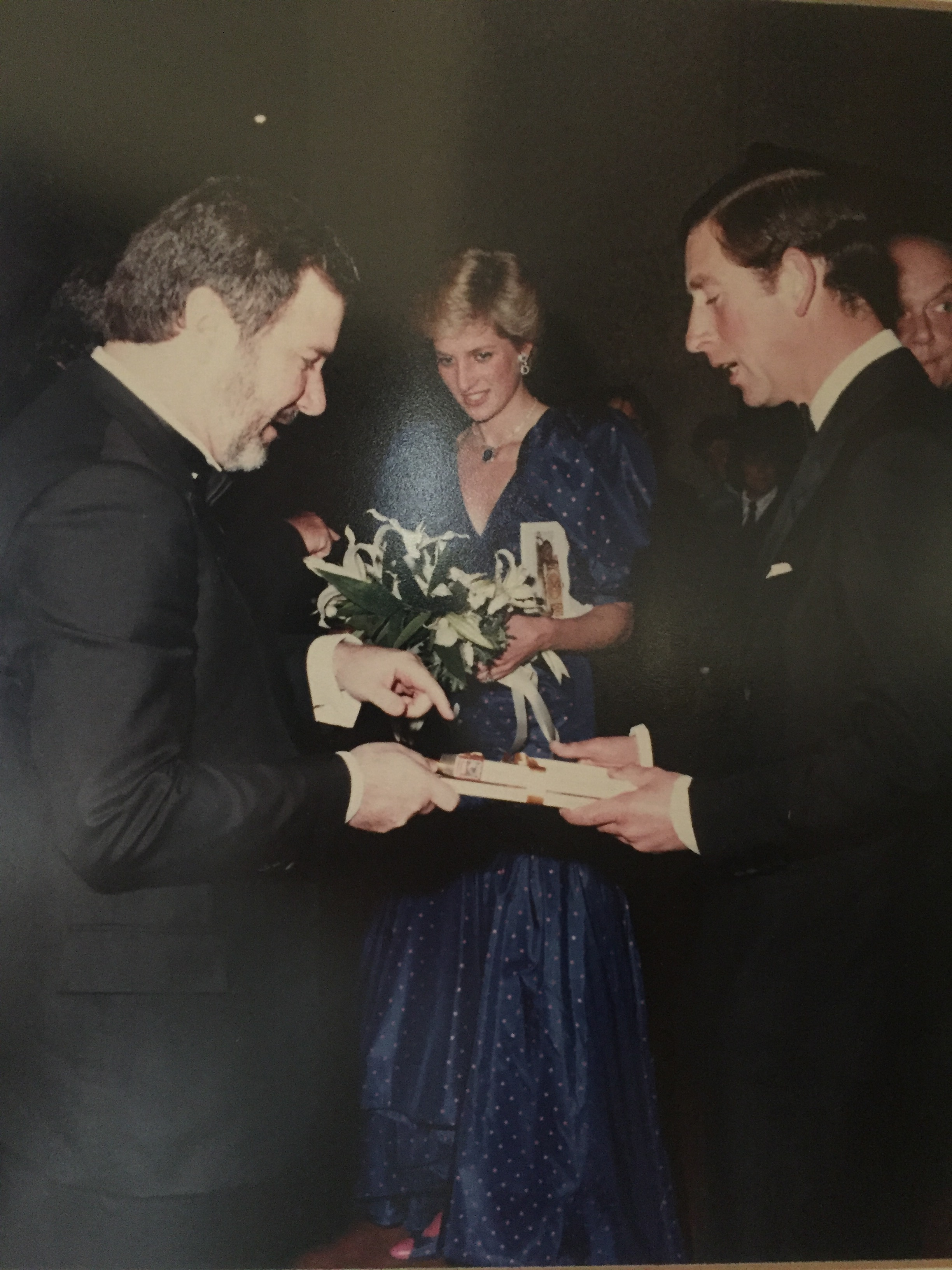 יורם גלובוס מקבל פרס מהנסיכה דיאנה באנגליה